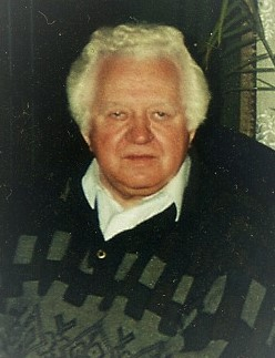 Народный артист Украины Михаил Ткач. Фото сделано нецифровой камерой в 2001 году в квартире его сестры Надежды Николаевны в городе Черновцы. Оцифровано в 2014 году. Фрагмент группового фото Ткача, Мельникова, Ватаманюка